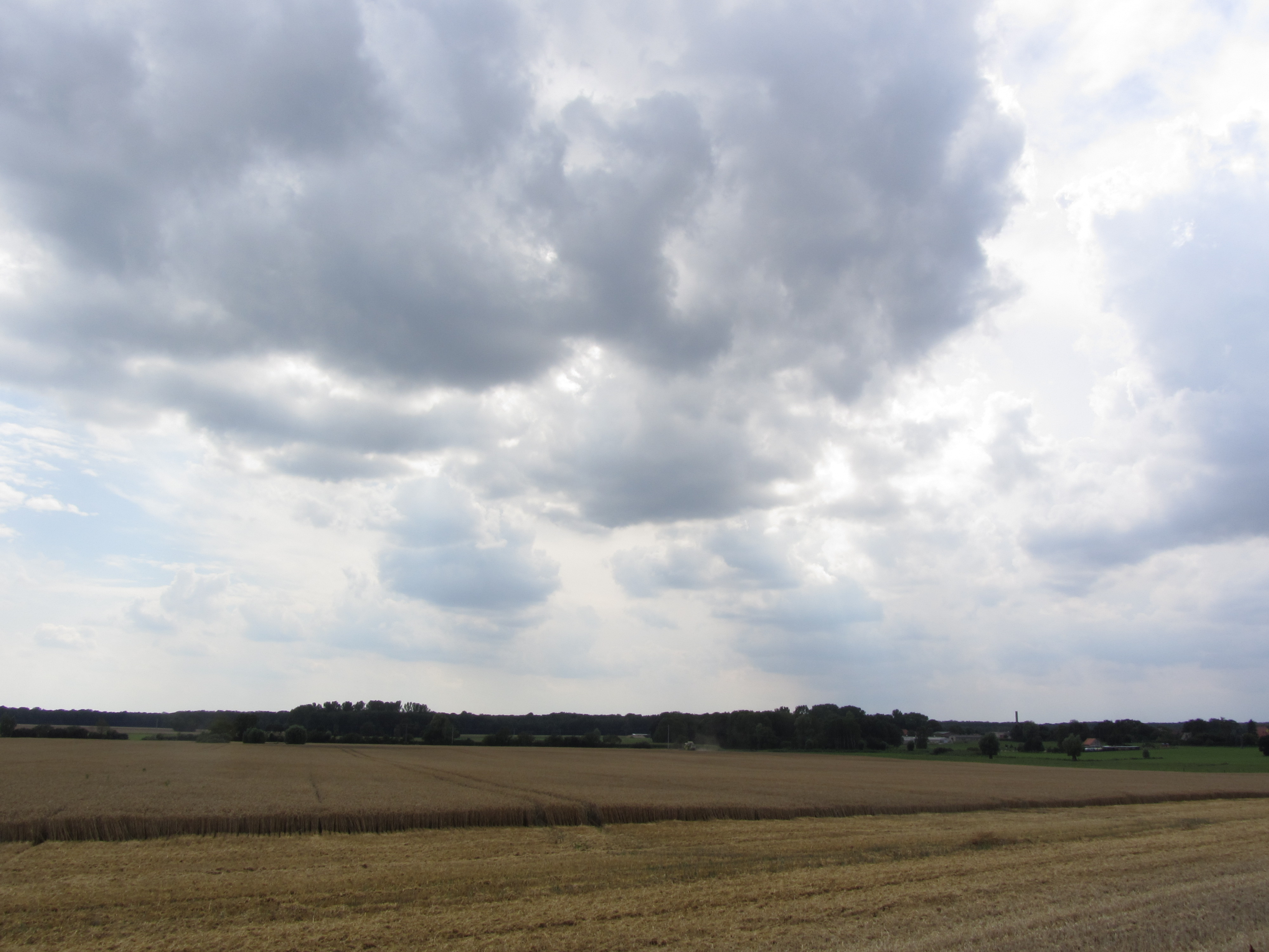 Feld Wolken Ernte